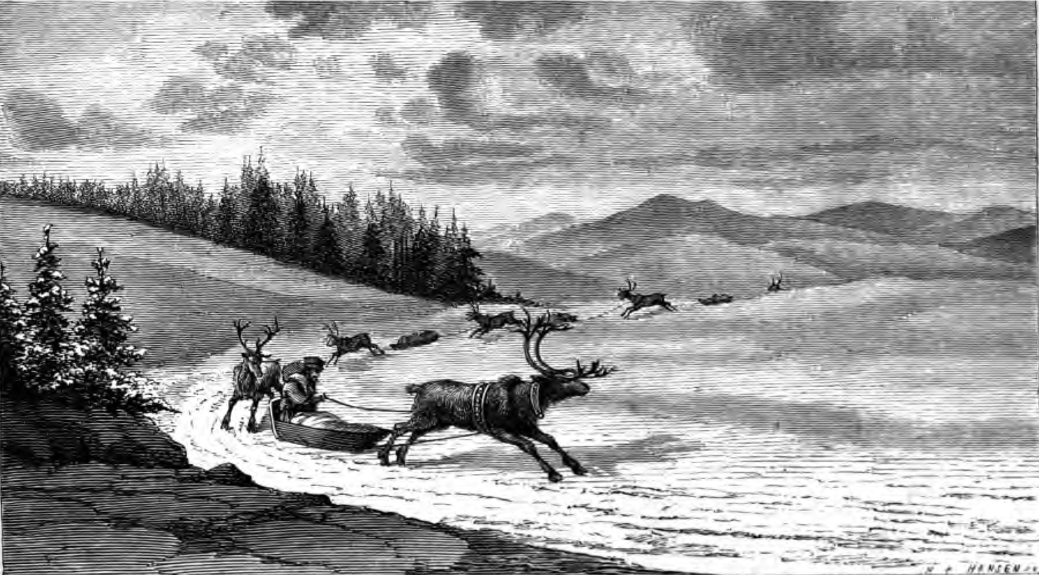 En Raide